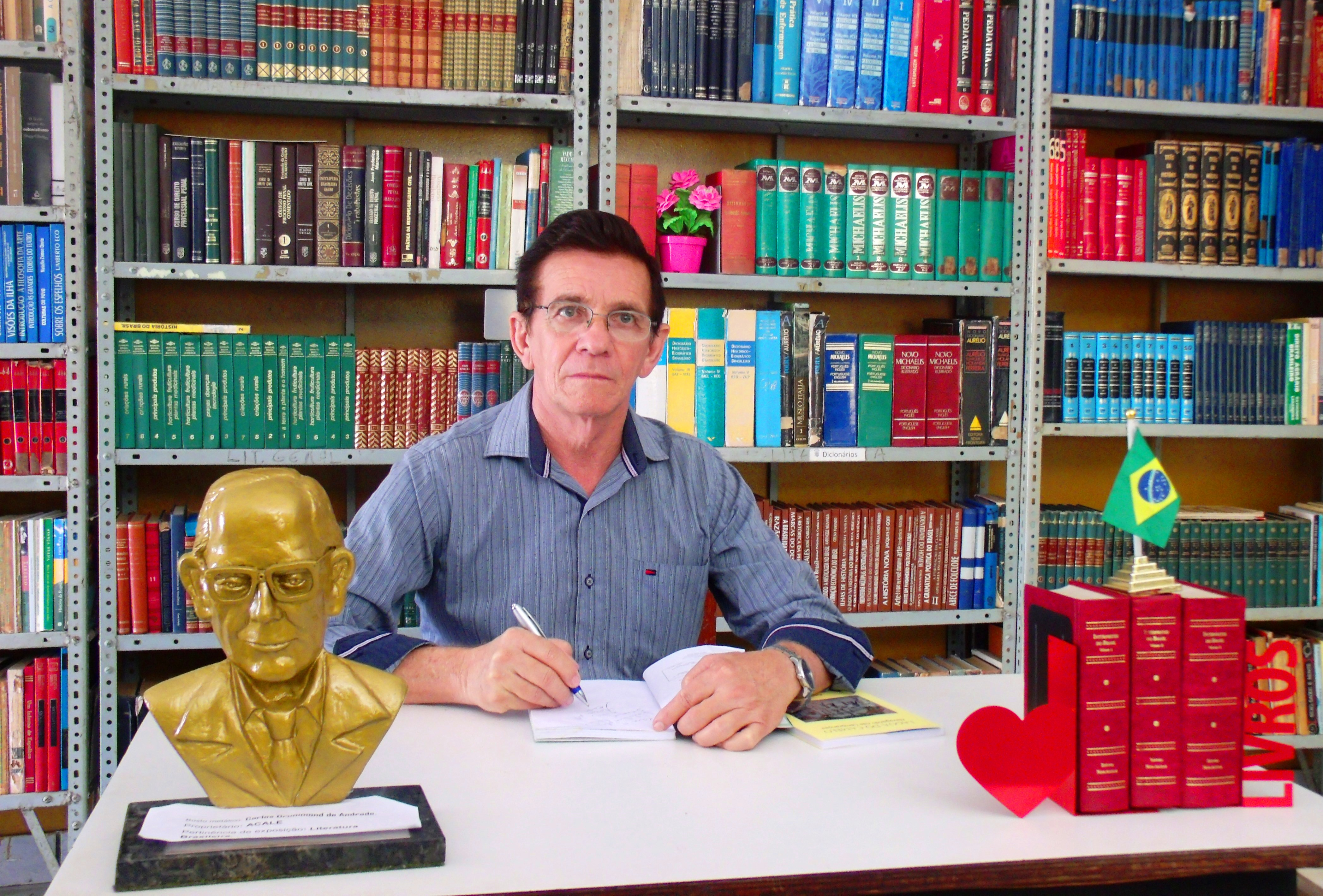 Escritor Adrião José Neto autografando obras no interior de uma biblioteca pública no Piauí. O busto na mesa é de Carlos Drummond de Andrade.